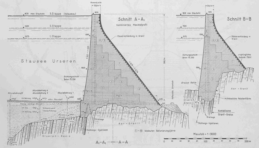 Querschnitt der Staumauer in der Schöllenenschlucht für das Urserenkraftwerk-Projekt von 1943/44. Die Zahlen in den Kreisen geben an, in welchem Jahr der über zehn Jahre dauernden Bauperiode der Beton eingebracht worden wäre.